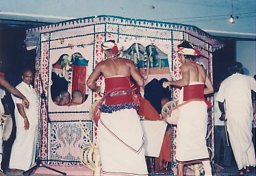 பிரித் கொட்டுவ - இலங்கை பௌத்த மக்களின் மத அனுஸ்டான மரபு முறைகளில் ஒன்று. பிரித் எனப்படும் வேதம் ஓதப்படும் போது அமைக்கப்படும் விசேட அலங்காரக்கூடு. இதற்குள் அமர்ந்த படியே பௌத்த மத குருமார் வேதம் ஓதுவர்.